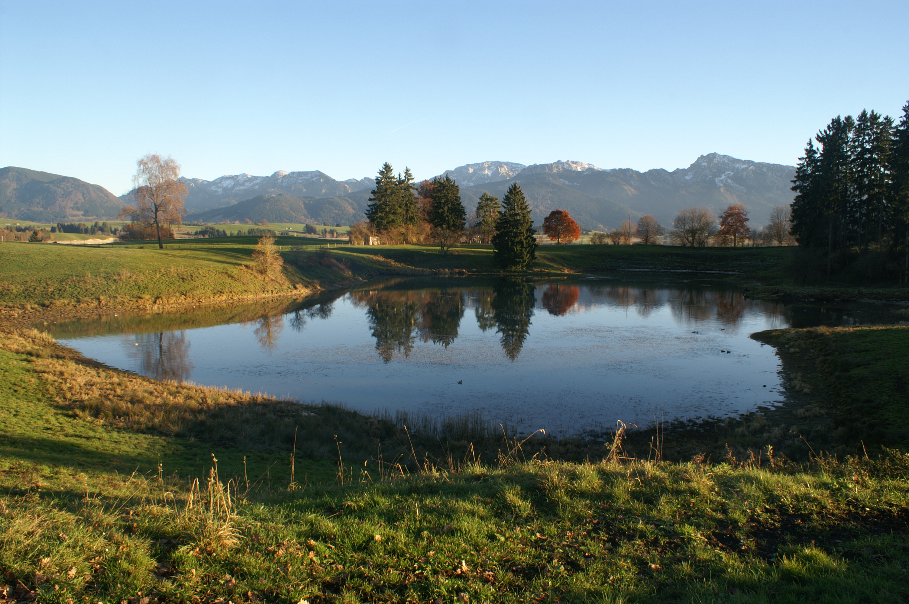 Toteisloch bei Dietringen, Rieden am Forggensee